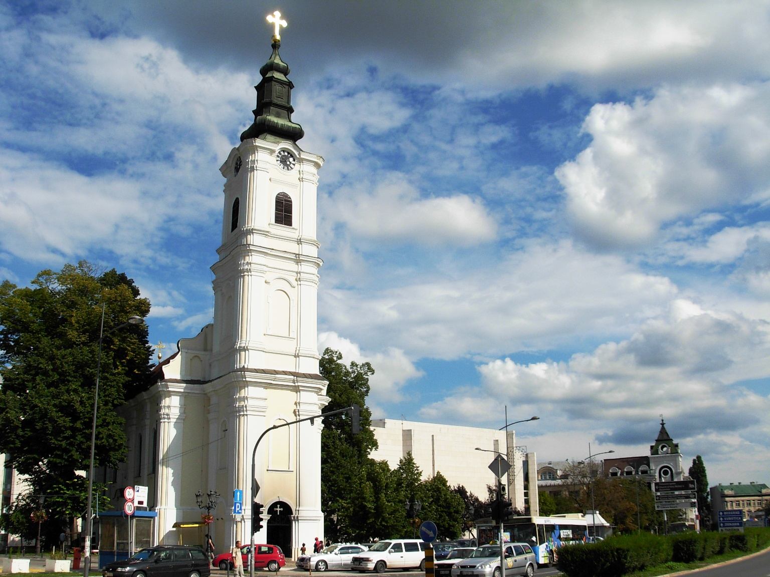 Uspenska crkva u Novom Sadu.